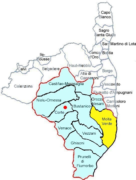 Localisation du canton de Moita-Verde, Castagniccia, Aleria, Haute-Corse